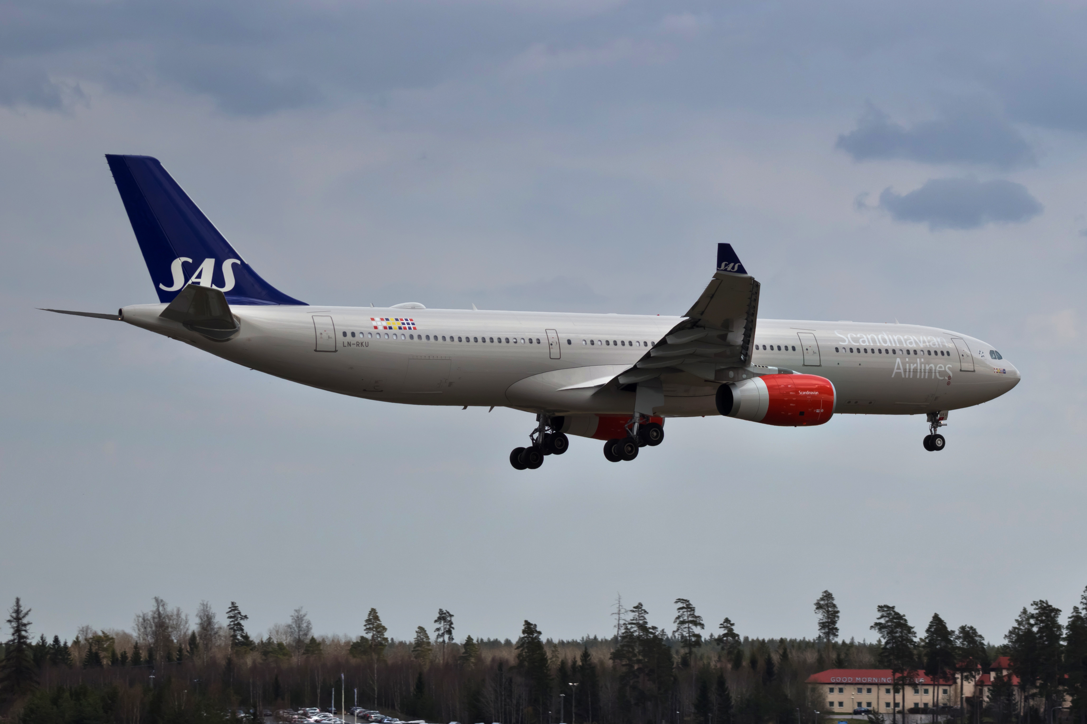 Airbus A330 de SAS aterrando no aeroporto de Estocolmo-Arlanda.